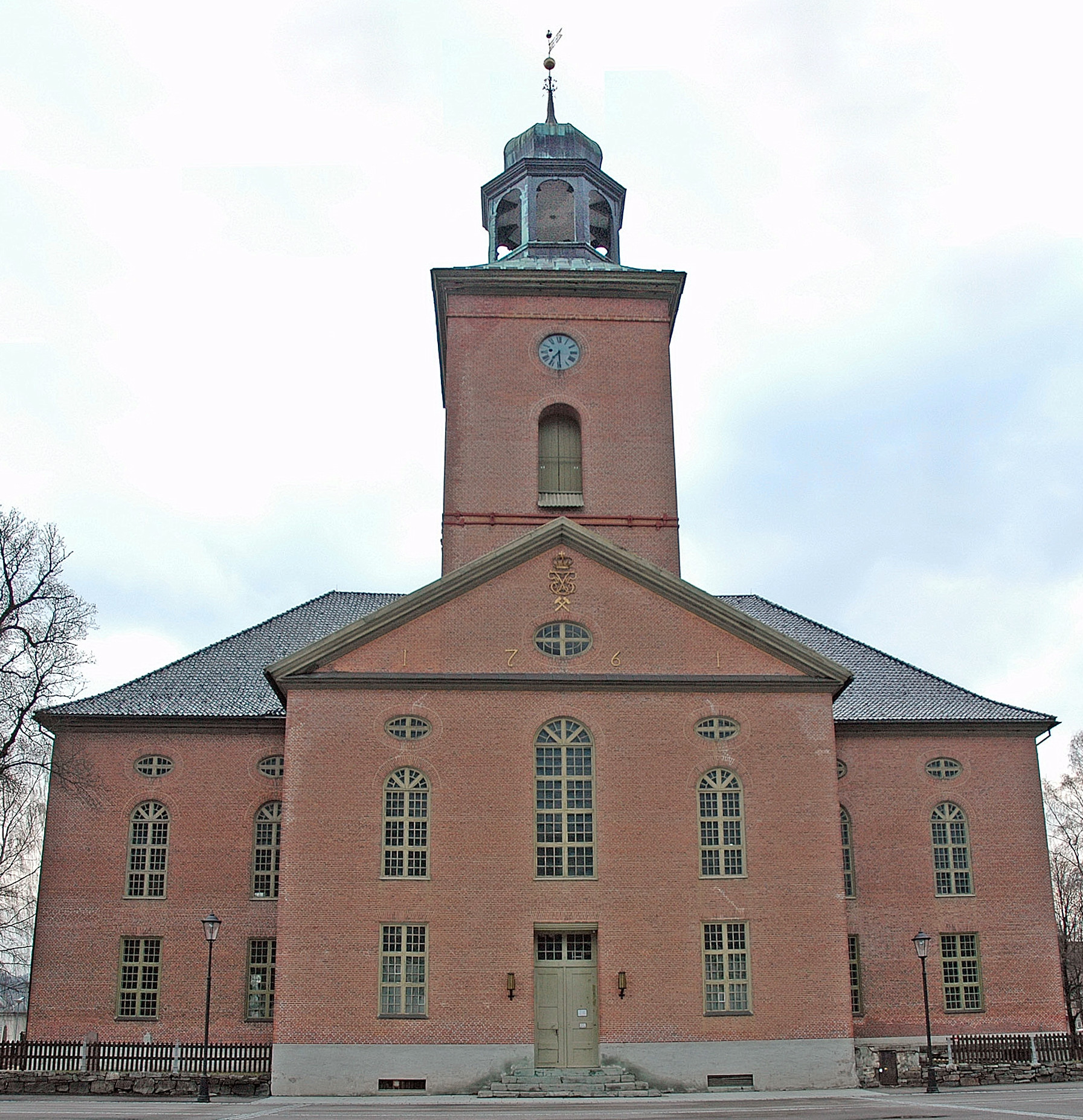 Kongsberg Kirke, Kongsberg